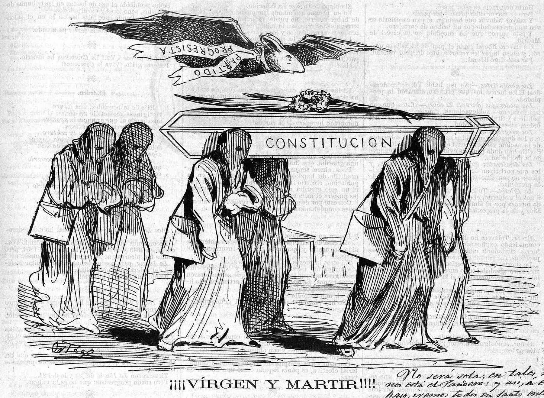 ¡¡¡¡Virgen y mártir!!!!, en la revista satírica española Gil Blas.